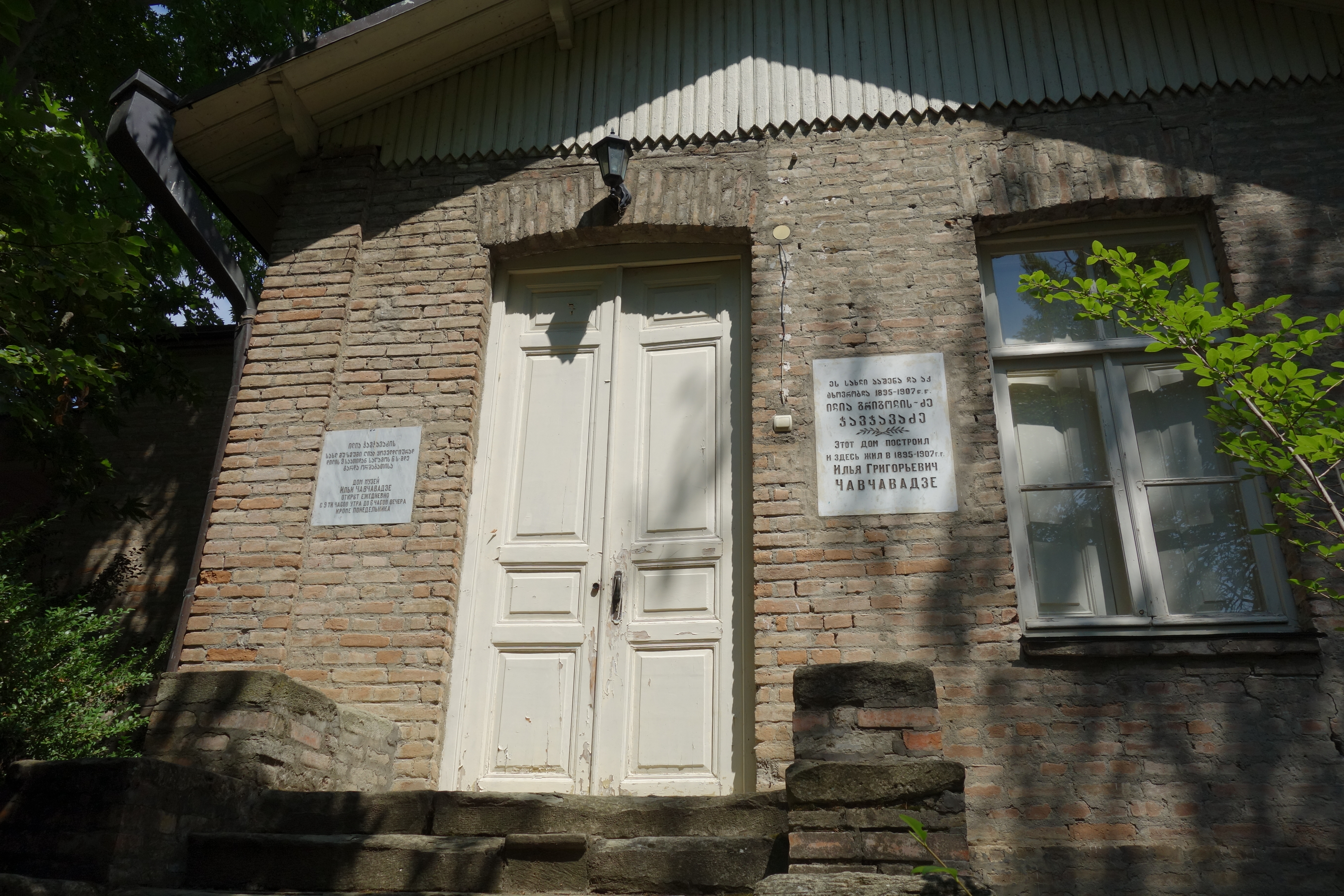 Ilia Chavchavadze House Museum, Saguramo, Georgia